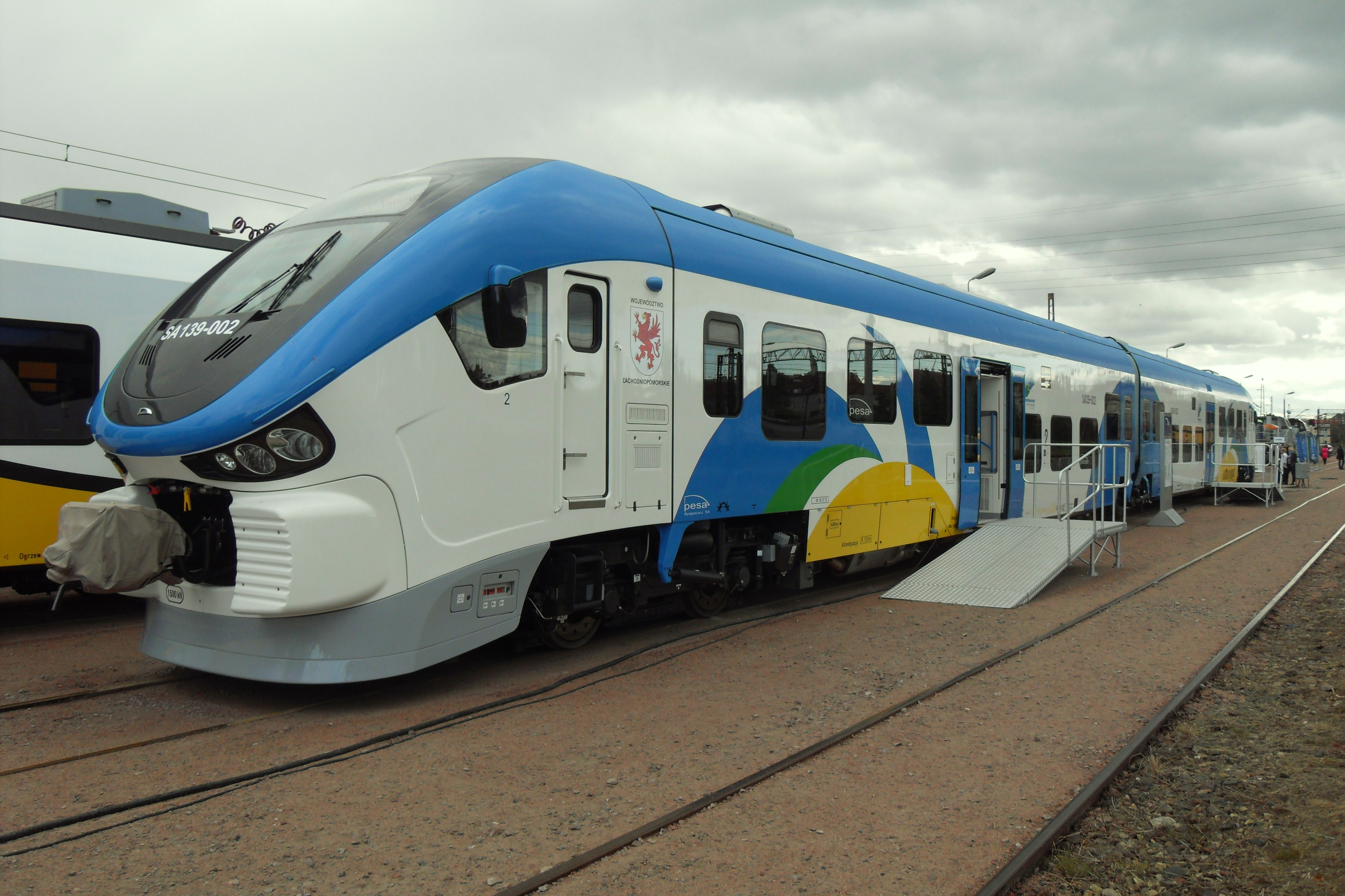 TRAKO 2013 w Gdańsku: PESA SA139-002.